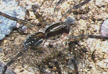 male Pirata clercki from Okinawa.